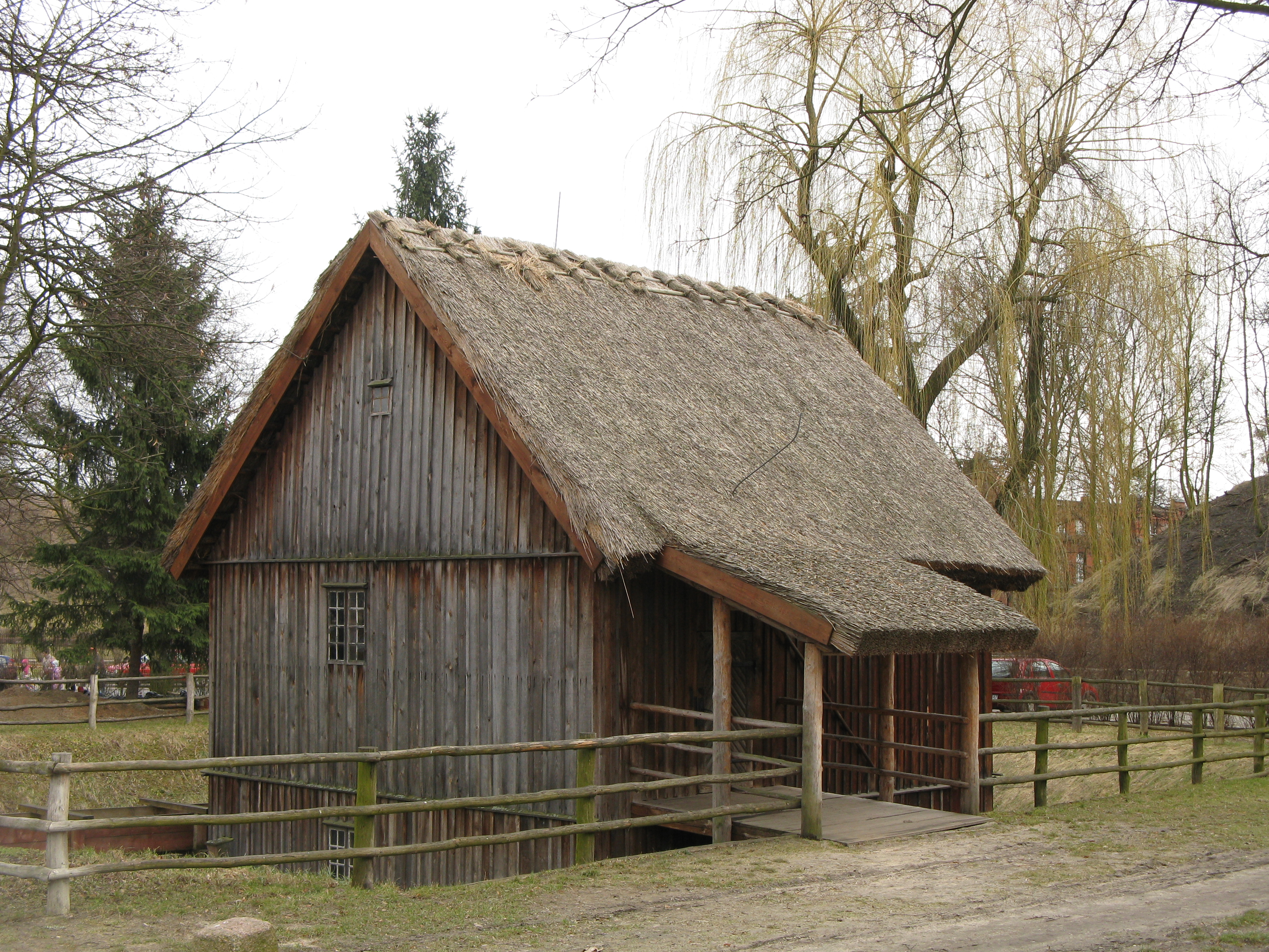 Młyn wodny w Muzeum Etnograficznym w Toruniu